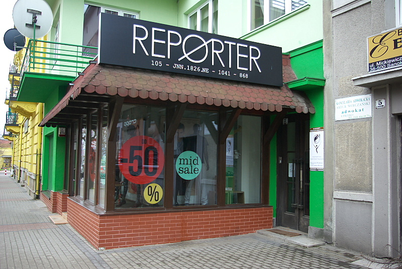 Sklep reporter ul Mickiewicza Sanok